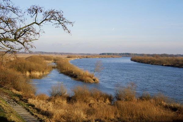 Wyszków – widok na Bug z mostu drogowego.